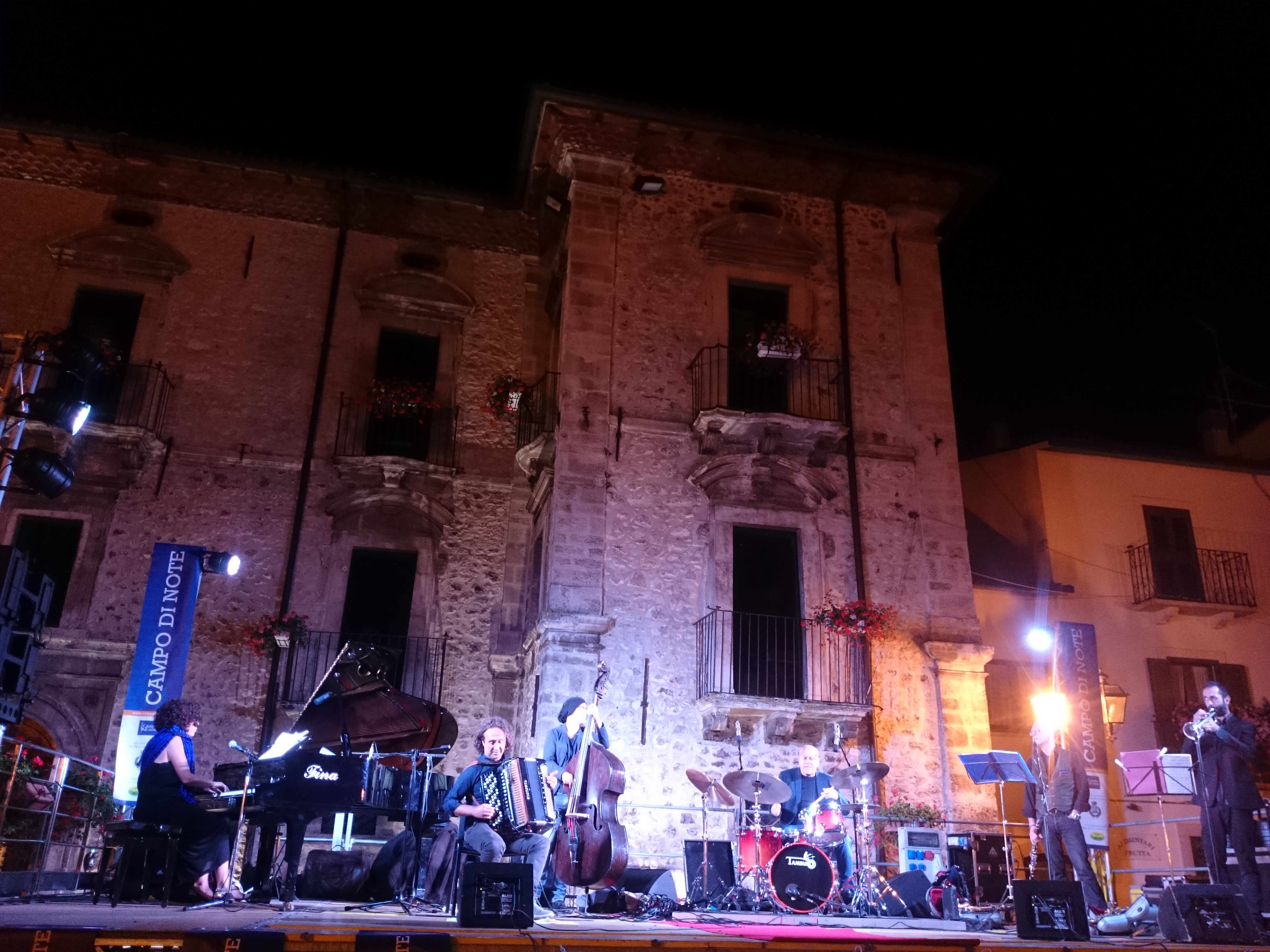 Uno dei concerti del Festival Campo di Note in piazza Duval